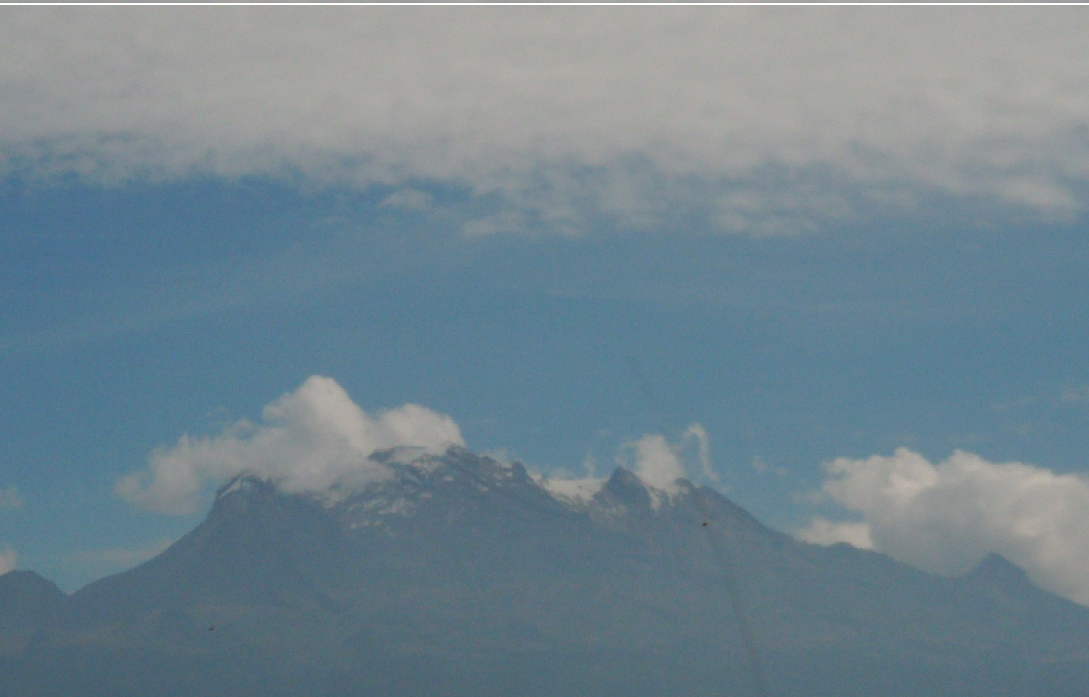 La atmosfera gris característica de las grandes ciudades también afecta a las zonas verdes, es uno de los aspectos más negativos del desarrollo poblacional. En México se observa un cambio drástico y acelerado por la contaminación, la cual ha generado perdida de masas de hielo de las grandes montañas.